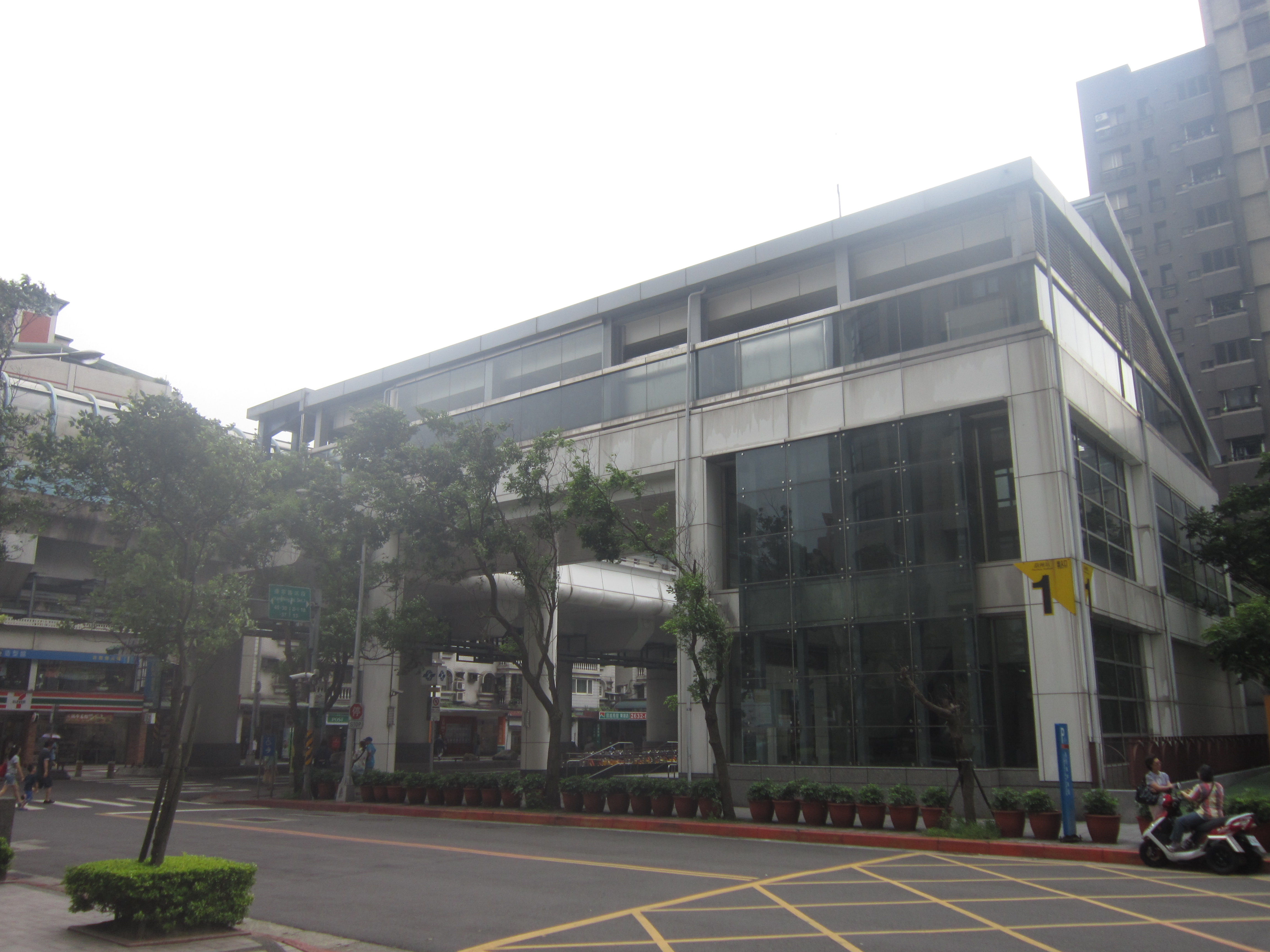 捷運葫洲站一號出入口的建物外觀